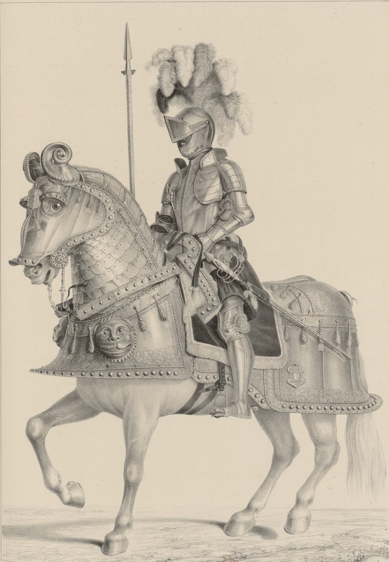 Ilustración contenida en el libro La "Armeria real", ou Collection des principales pièces de la galerie d'armes anciennes de Madrid, de Achille LJubinal. Pieza dibujada de la colección de la Armería Real de España en Madrid